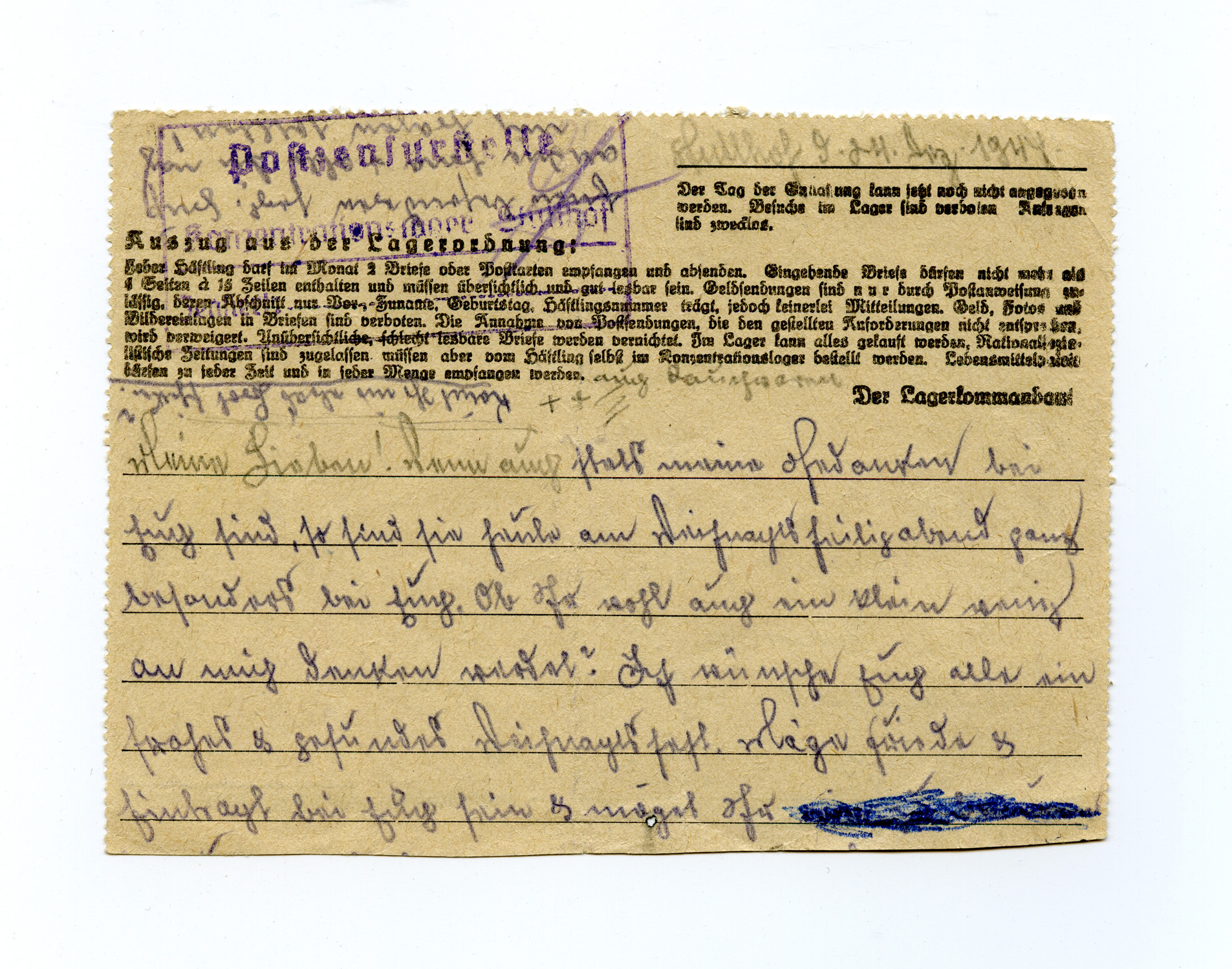 Brief aus dem KZ Stutthof. Text: Stutthof, d. 24. Dez. 1944. Meine Lieben! Wenn auch stets meine Gedanken bei Euch sind, so sind sie heute am Weihnachtsheiligabend ganz besonders bei Euch. Ob Ihr wohl auch ein klein wenig an mich denken werdet? Ich wünsche Euch allen ein frohes & gesundes Weihnachtsfest. Möge Friede & Eintracht bei Euch sein & möget Ihr [... untere Hälfte fehlt] Einen besonderen herzl. Gruß an Ine, Erna + alle, die nach mir fragen sollten. Könnt Ihr mir etwas Brot schicken? + auch Rauchwaren